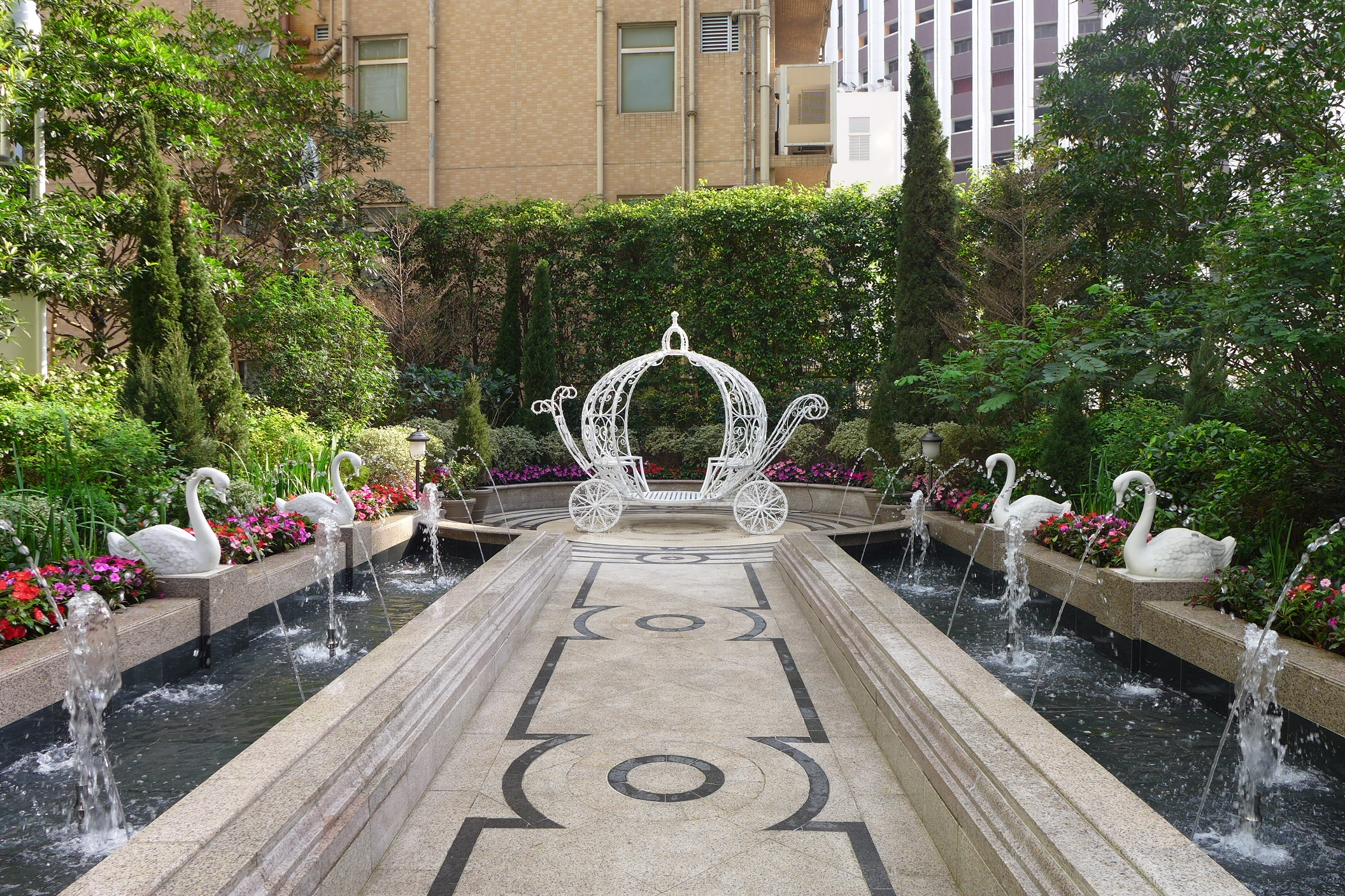 Lee Tung Avenue L5 Podium Garden